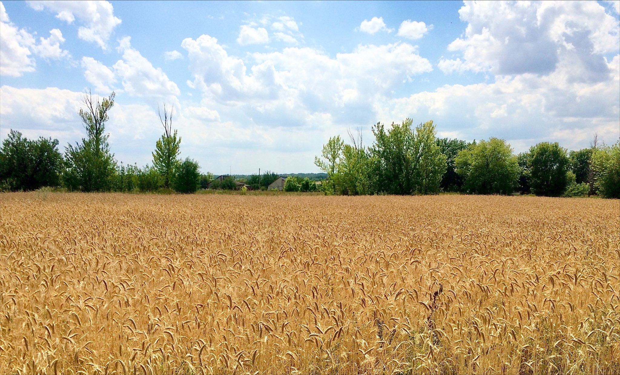 Фото зроблено в с. Гришине, Покровського р-ну, Донецької області